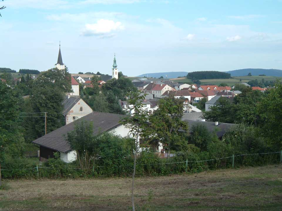 Bernstein, Burgenland, Austria